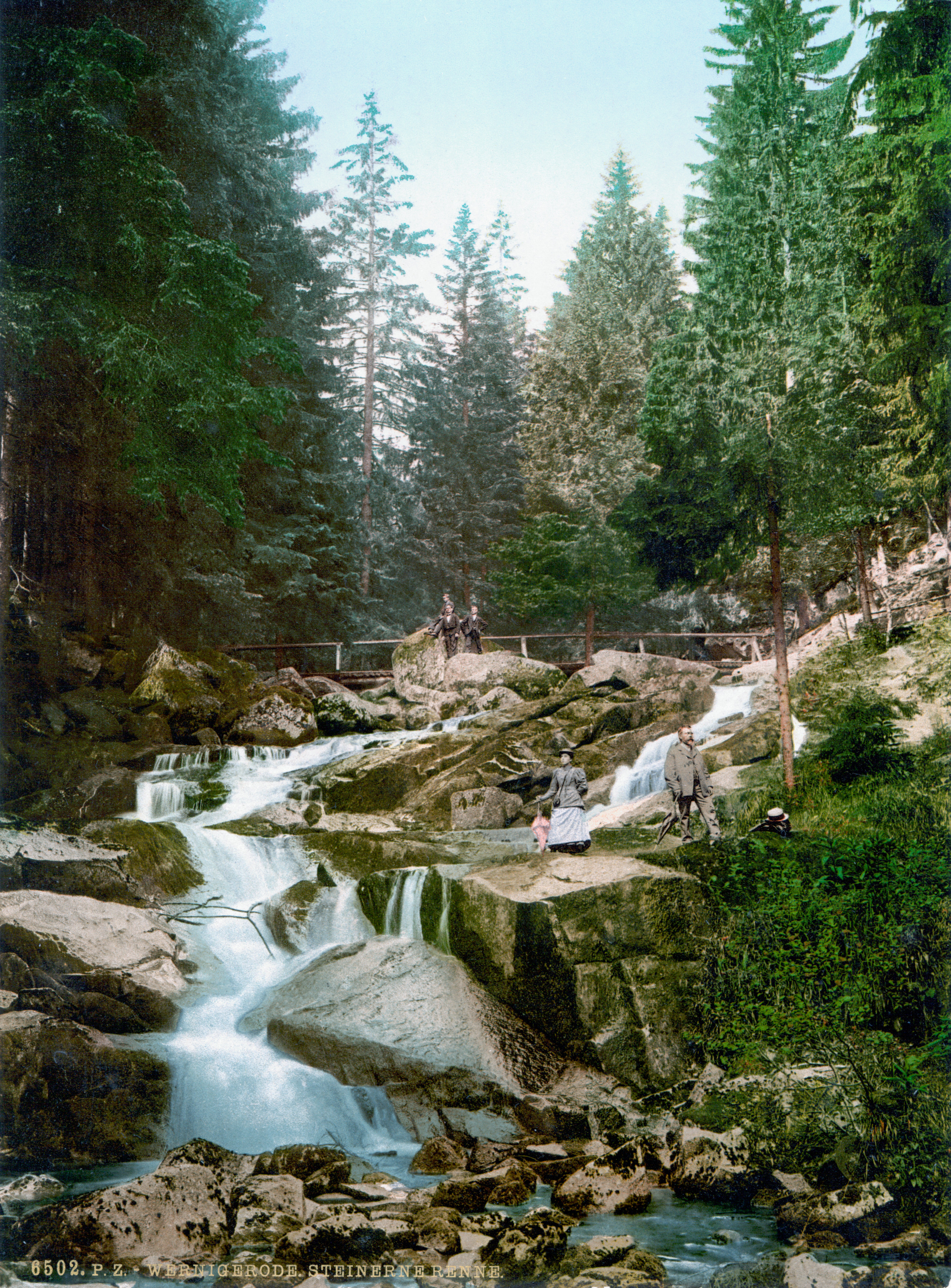 Steinerne Rinne, Wernigerode